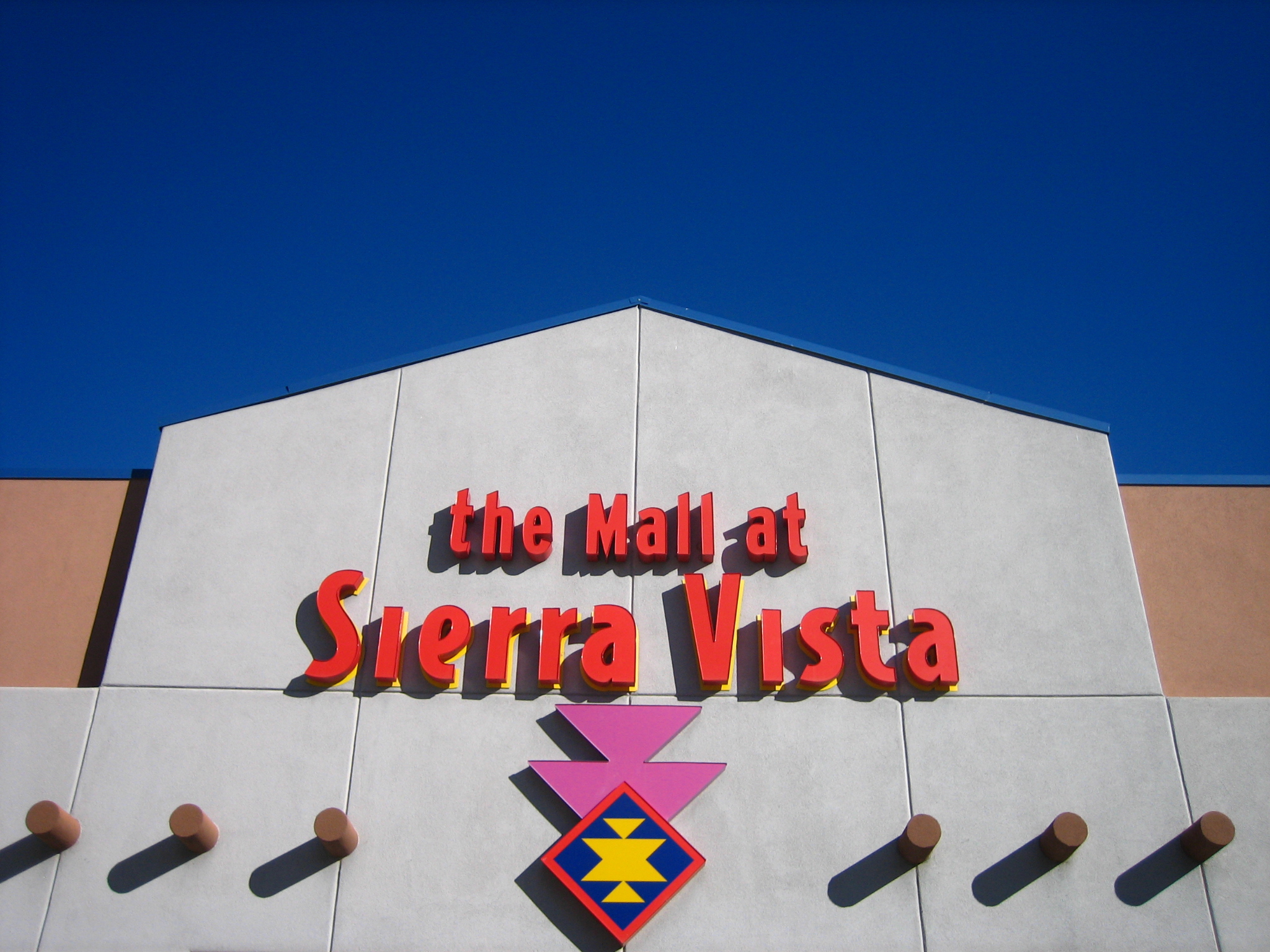 Sierra Vista, Arizona.